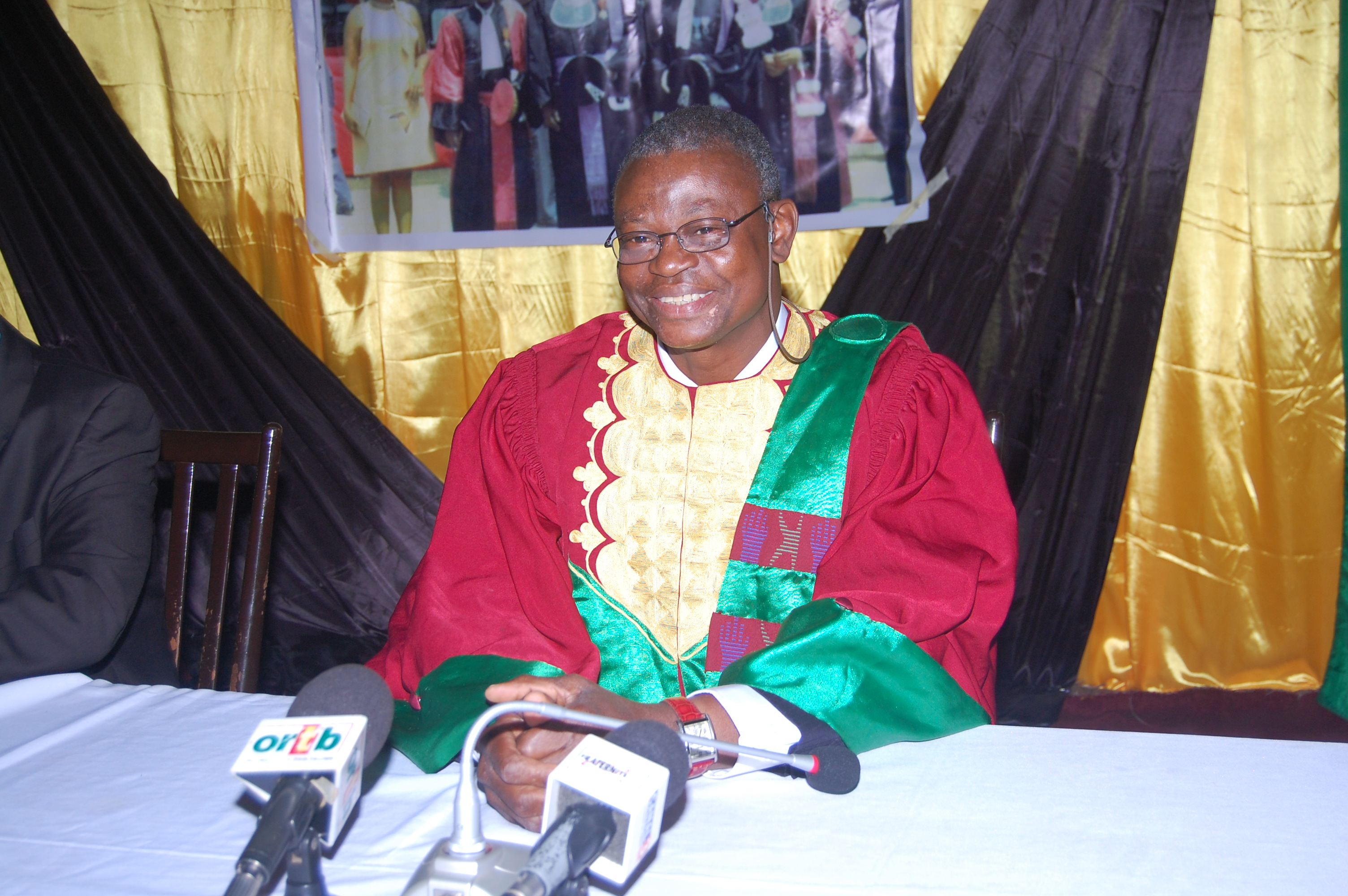 Recteur de l'Université d'Abomey-Calavi